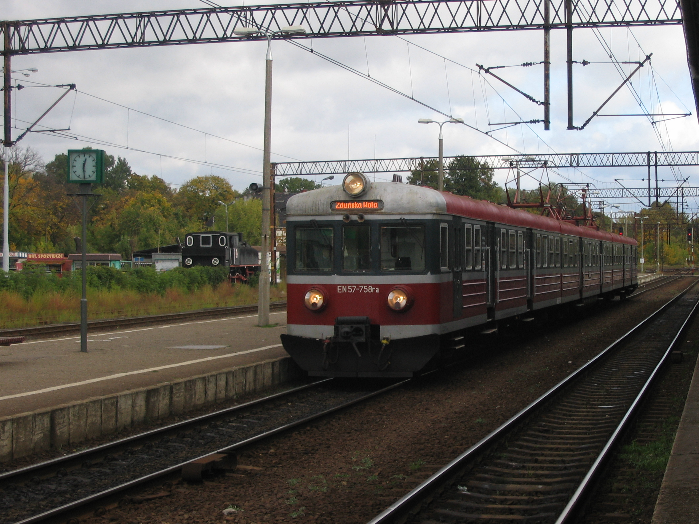 EN57-758 na stacji Toruń Główny, gotów do odjazdu jako pociąg osobowy nr 51332 relacji Toruń Główny - Zduńska Wola (odj. 12:30)